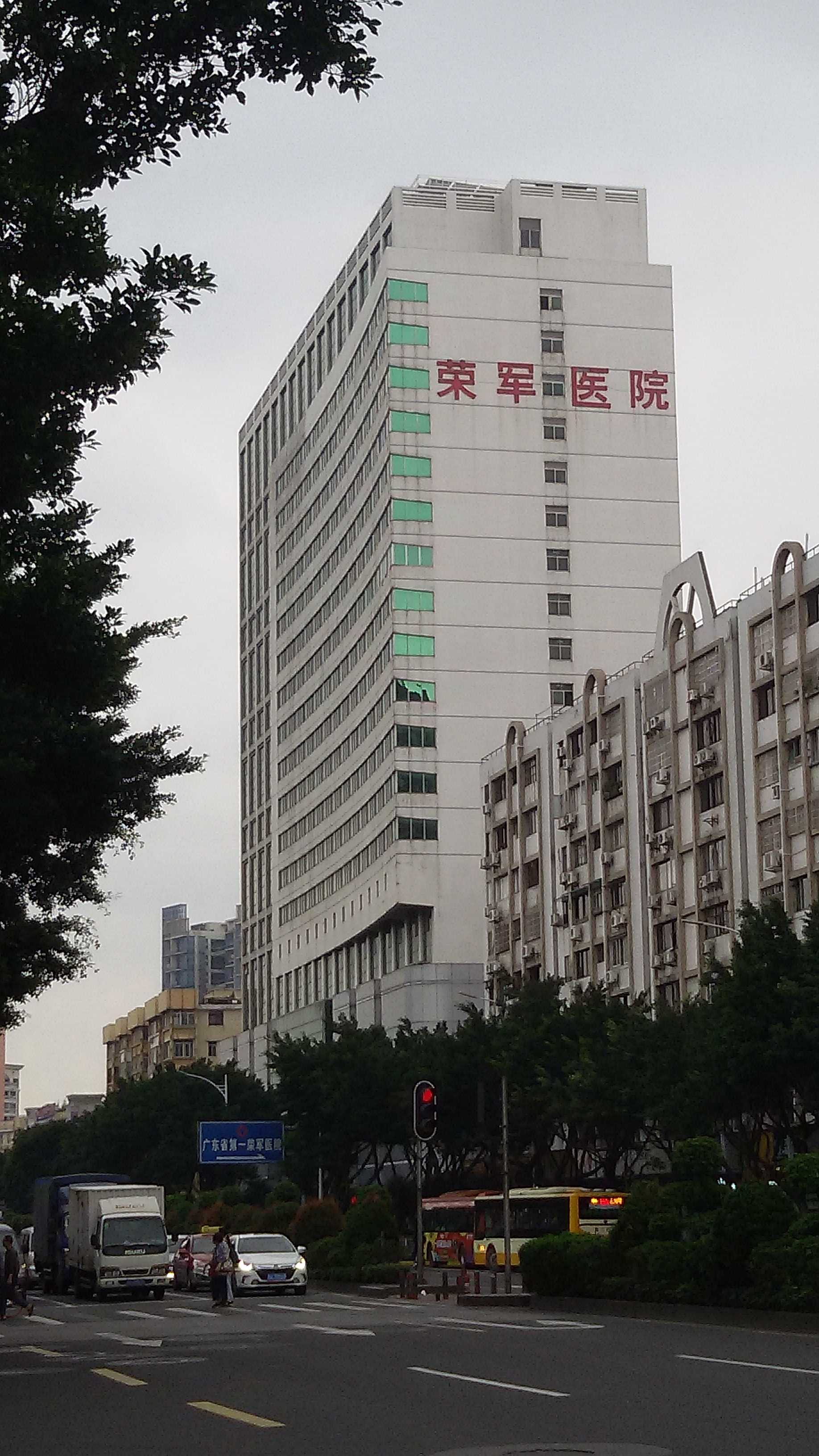 粵語: 廣東省第一榮軍醫院